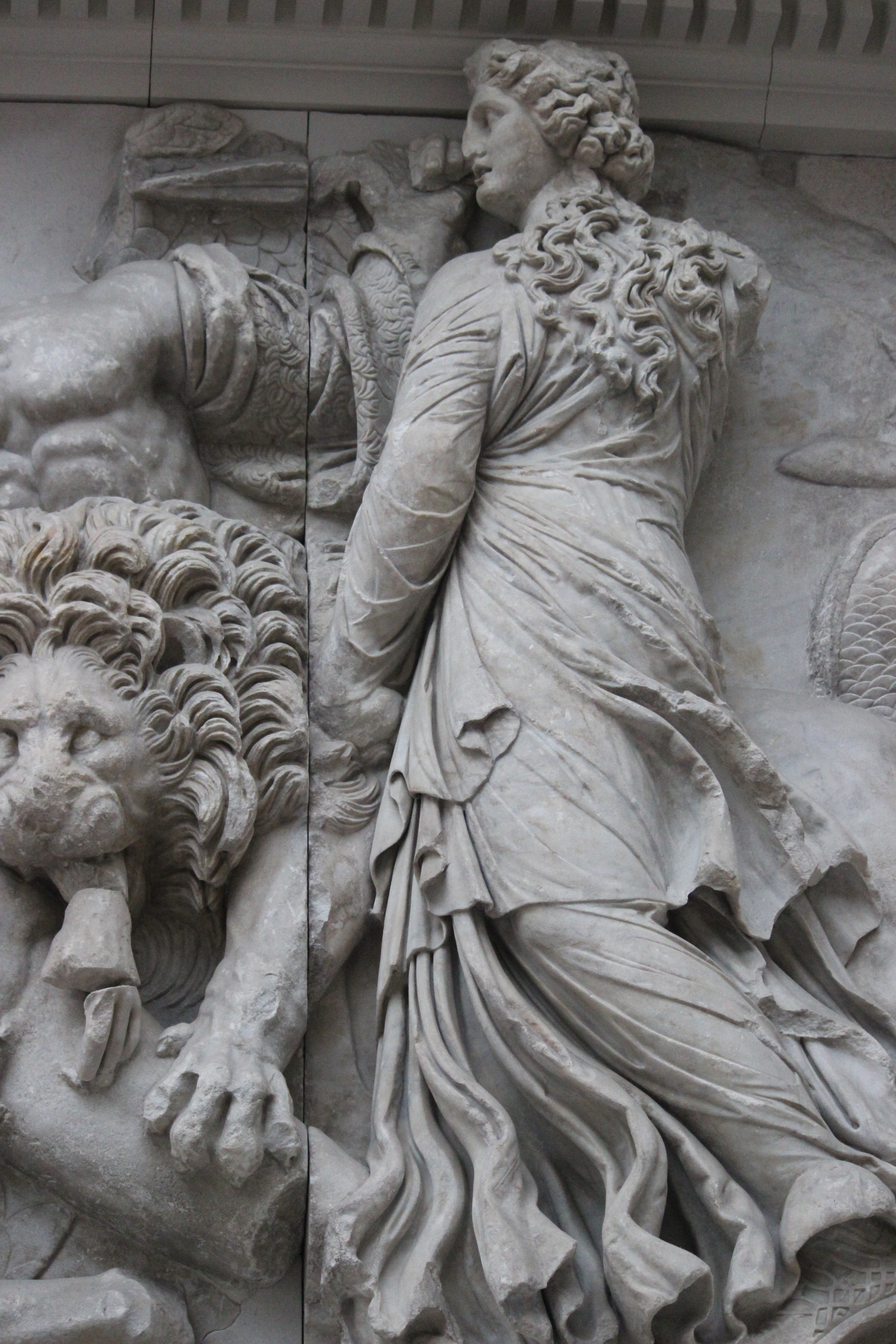 Keto lucha con los gigantes. Altar de Pérgamo.